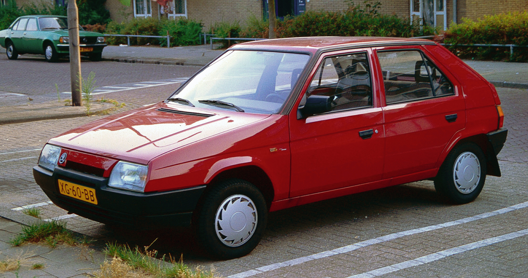 Skoda Favorit in Utrecht